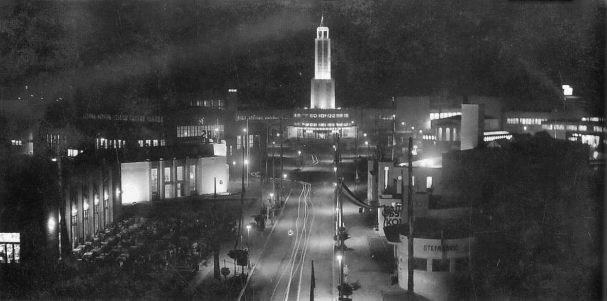 Београдски сајам је изграђен на основу одлуке Београдске општине 1936. године. Друштву за приређивање сајма и изложби је уступљен терен крај новоизграђеног Моста краља Александра. Прва фаза радова је започета у пролеће 1937. године, а завршена је до отварања, септембра 1937. Друга фаза, у којој су изграђени Турски и велики Немачки павиљон, завршена је 1938. Планирана је изградња и шестог југословенског павиљона, али су радови обустављени због избијања Другог светског рата. За време Другог светског рата га је Гестапо користио као концентрациони логор у ком је страдало око 48.000 људи.